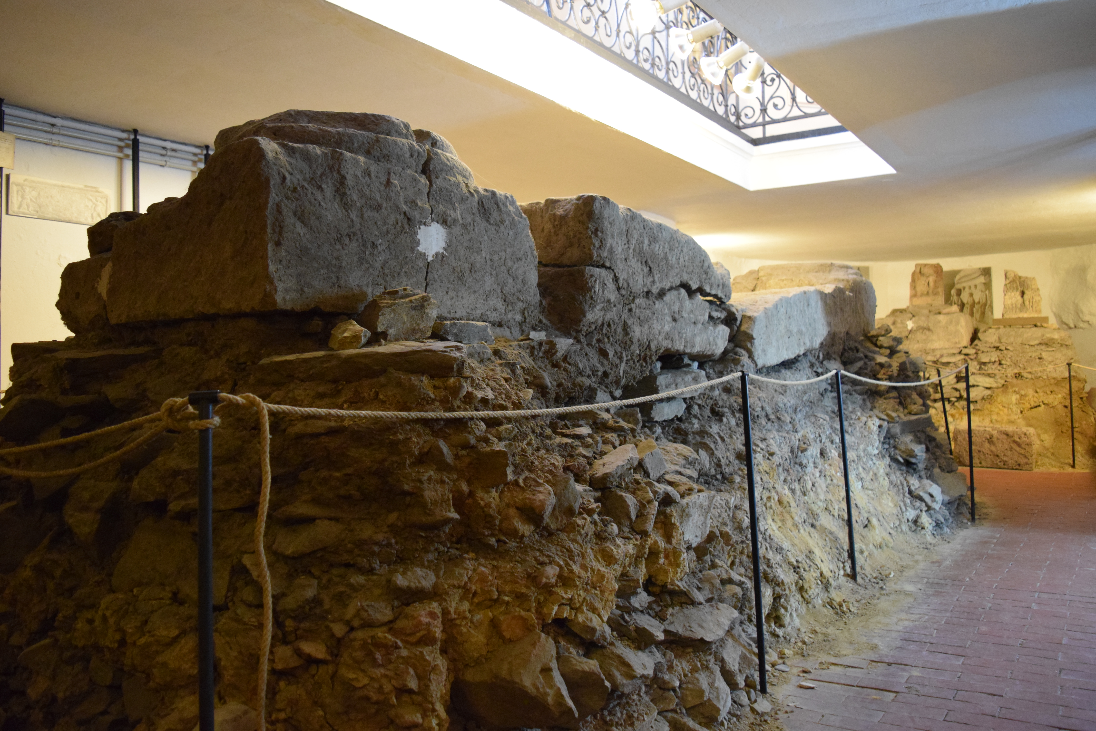 Nadrenia-Palatynat, Rigomagus Wikidata has entry Q3431966 with data related to this item.